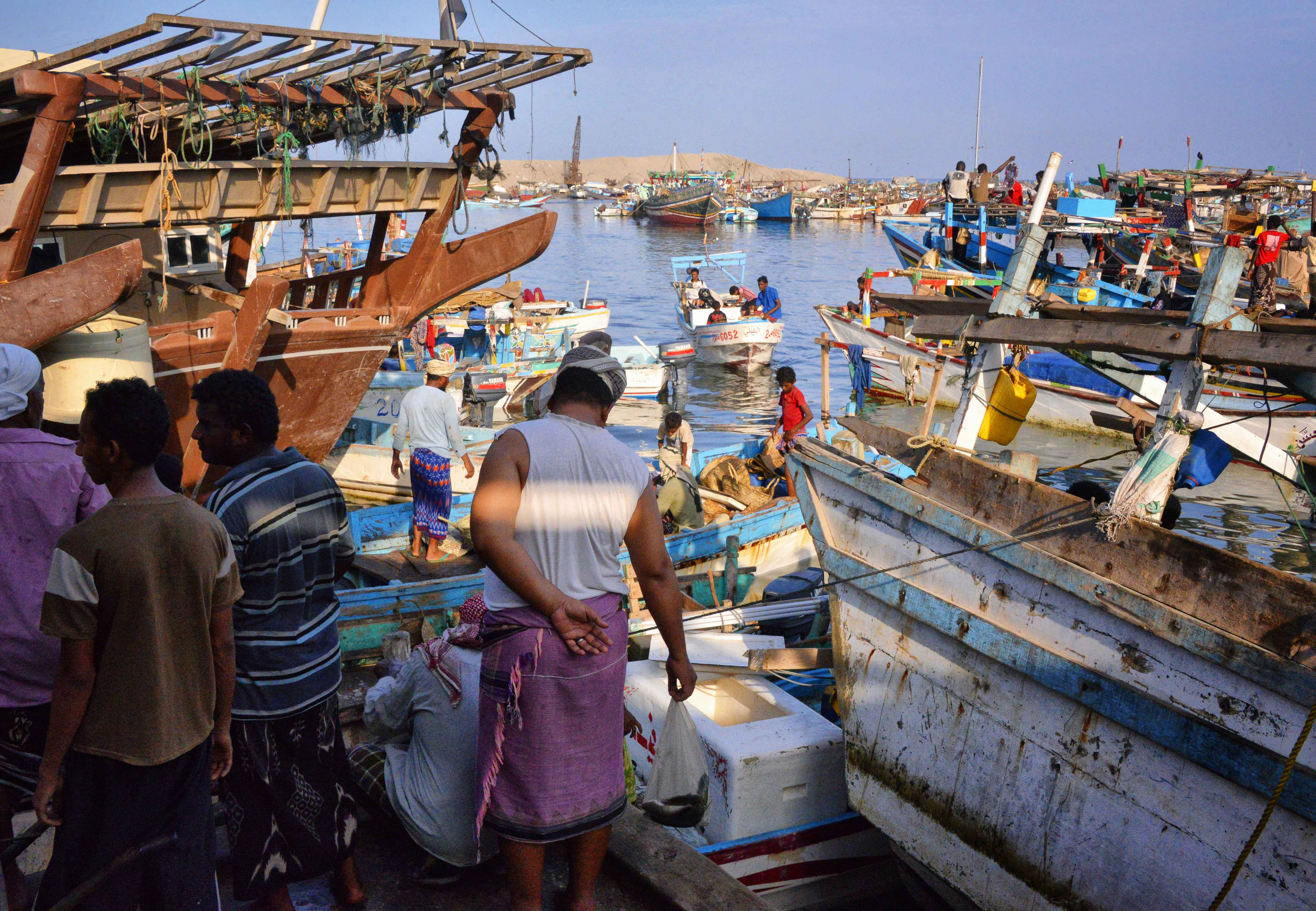 Fish Market, Yemen